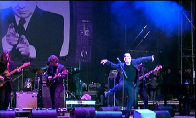 Finto Berlusconi Palco